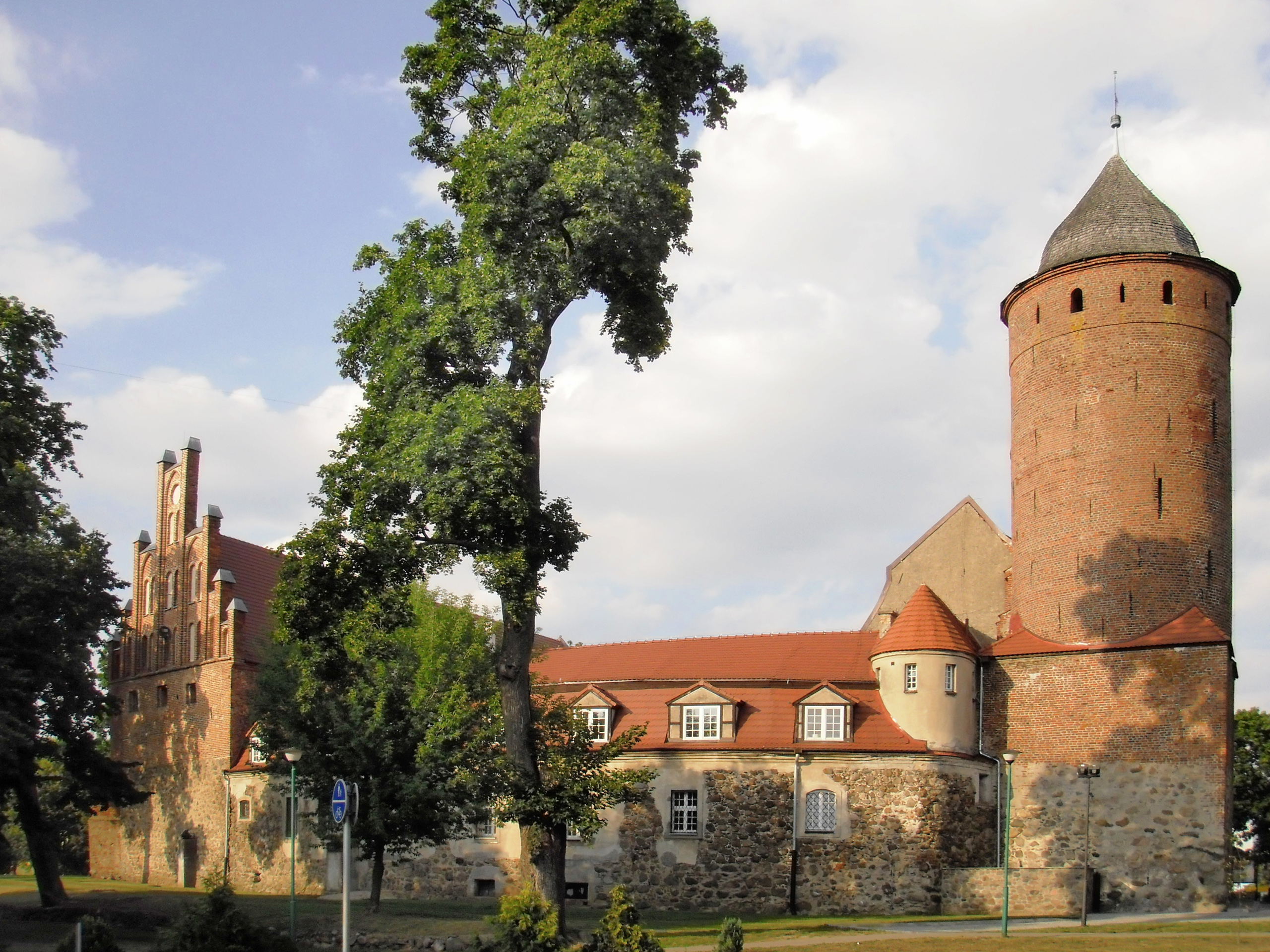 Świdwin, zamek, XIV-XVIII-XX